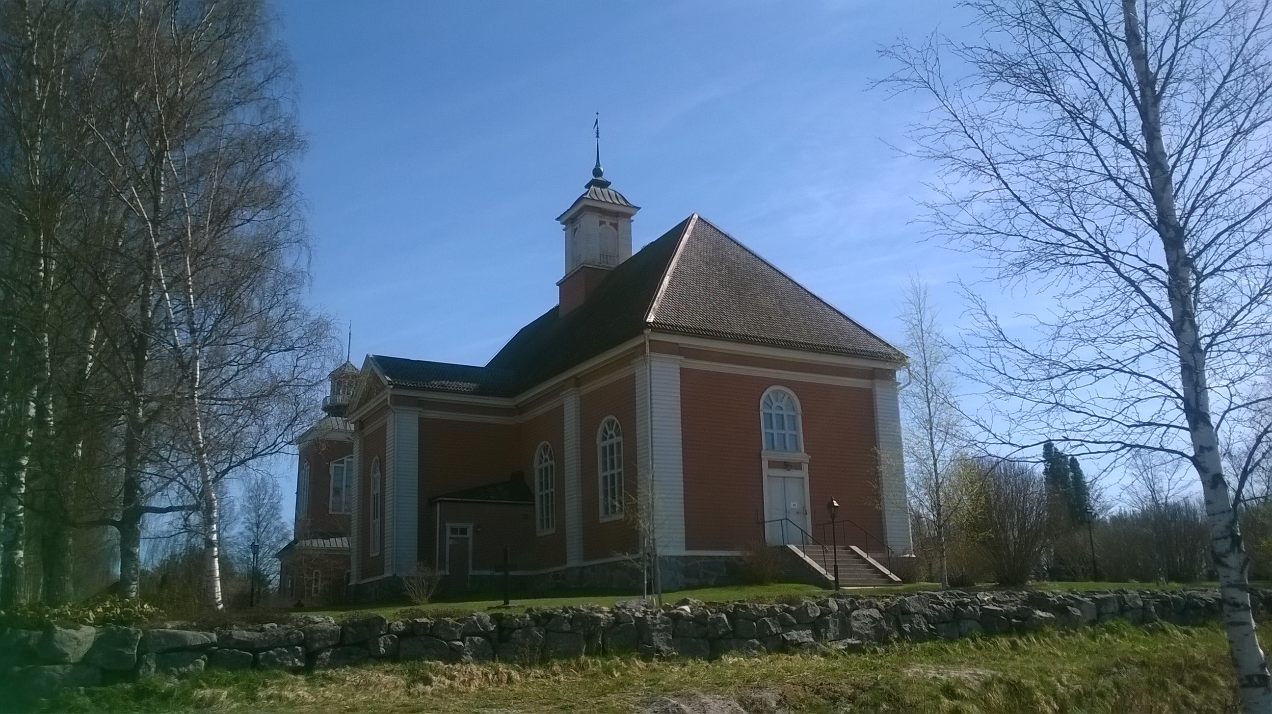 Sulvan kirkko, Mustasaari